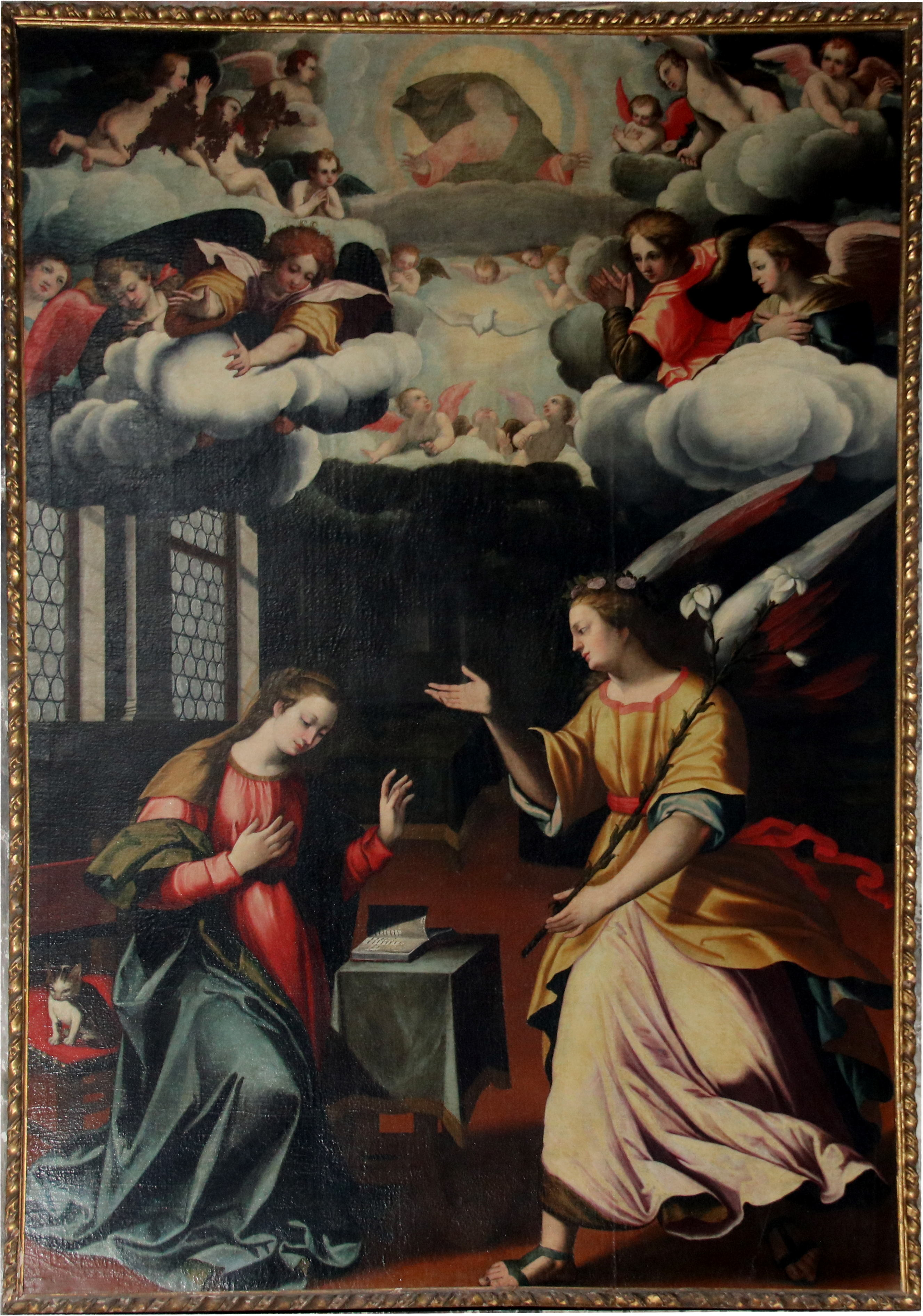 chiesa di San Sisto This is a photo of a monument which is part of cultural heritage of Italy.